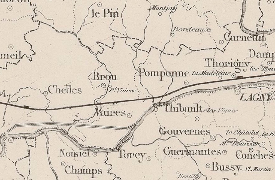 détail de la Carte routière et hydrographique de Seine-et-Marne, avec le tracé de la ligne de Paris à Strasbourg sur la commune de Vaires .